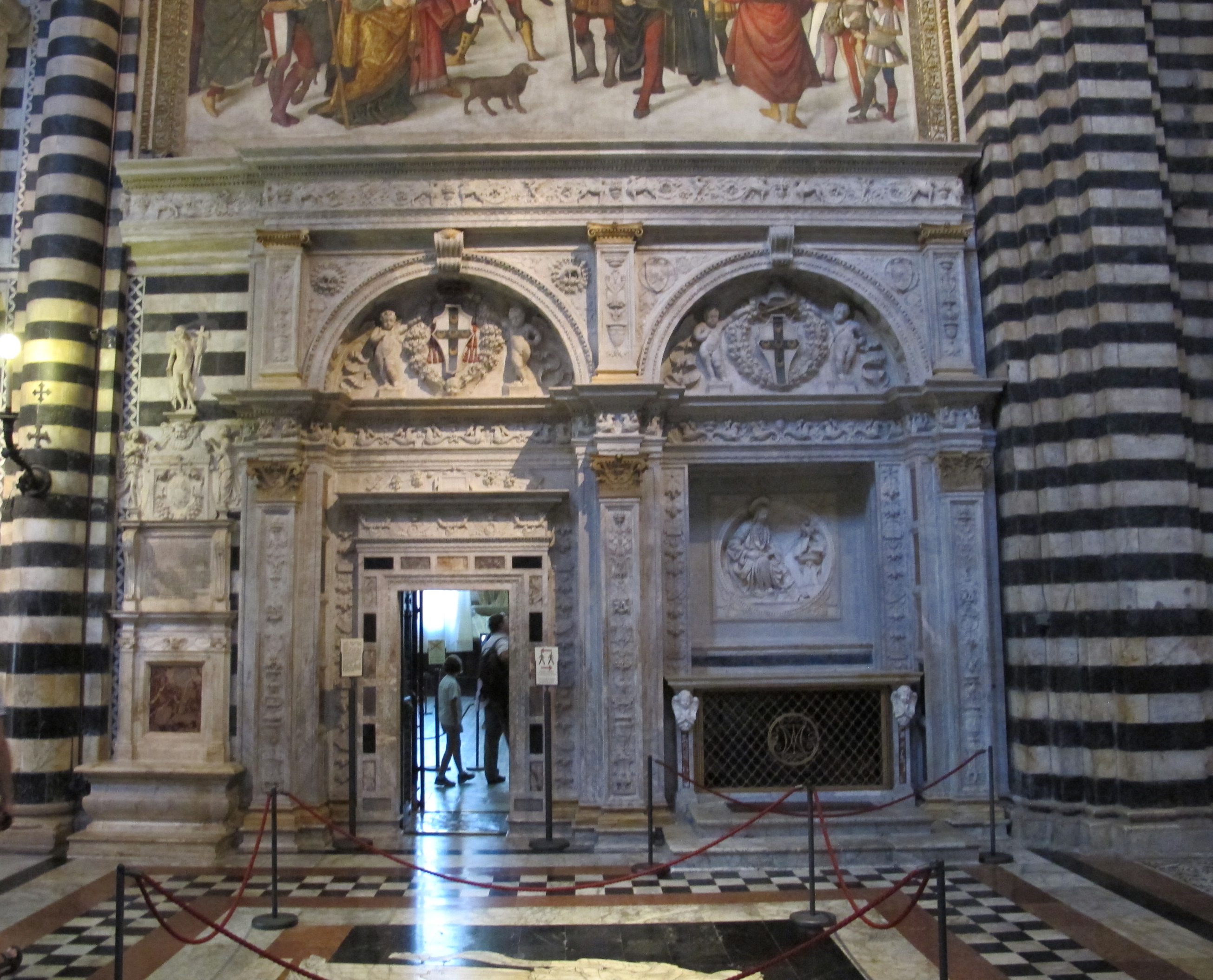 Portale della libreria piccolomini del marrina